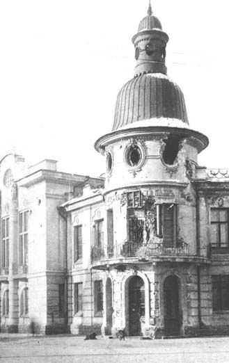 г. Иркутск. Русско-Азиатский банк после боев декабря 1917.